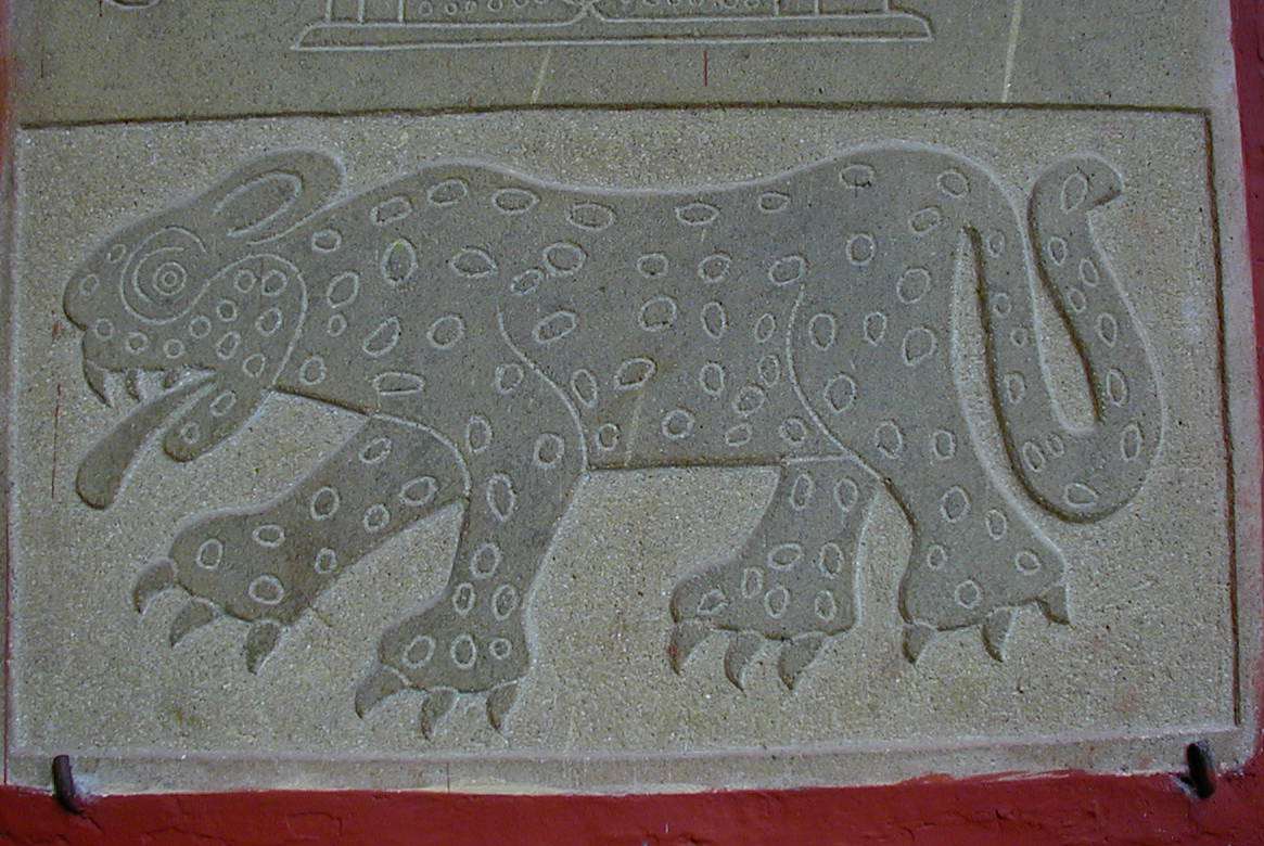 Gravure sur pierre représentant un jaguar. La photo a été prise à San Cristobal de las Casas au Chiapas dans le sud du Mexique